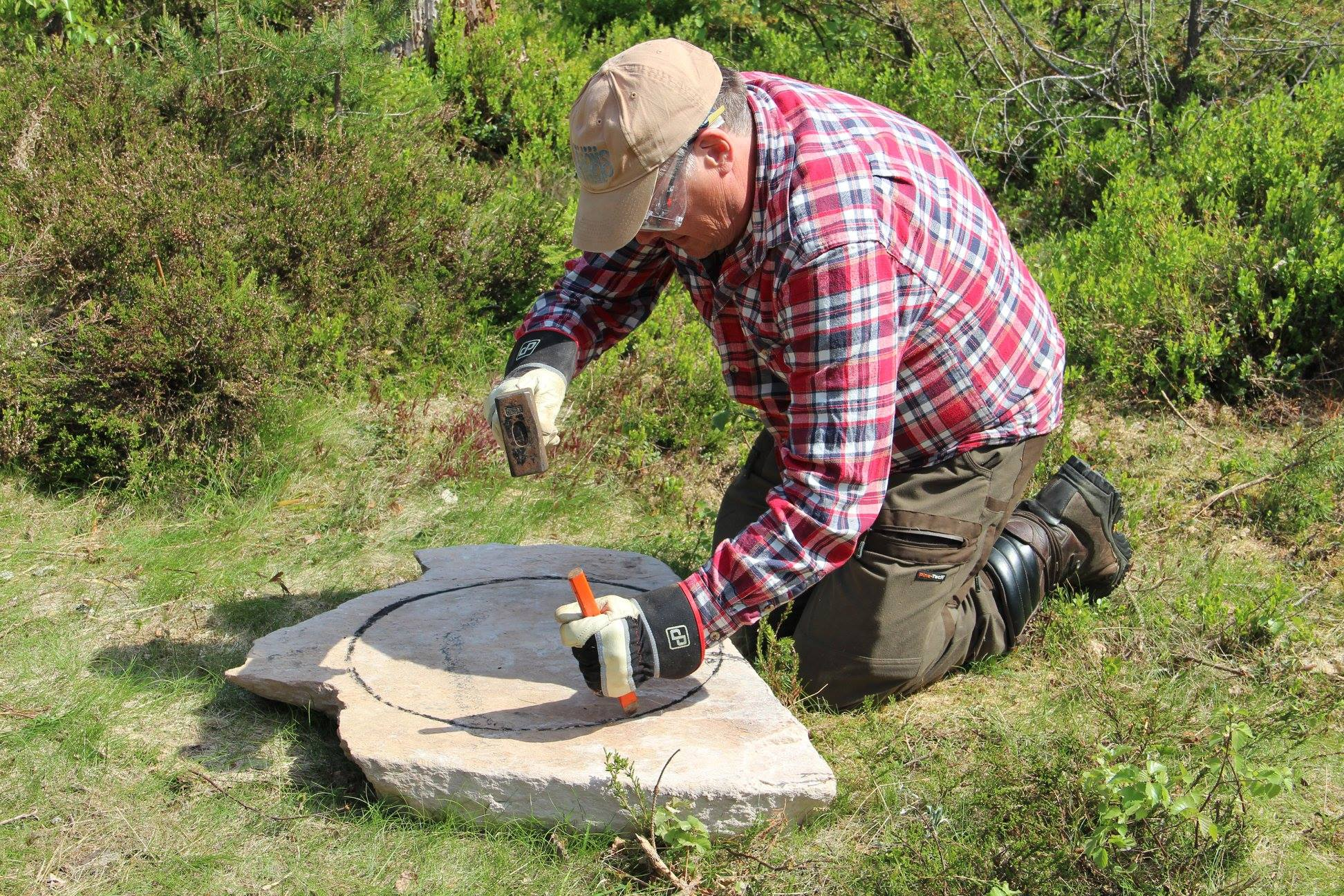 Vid en kurs som anordnades av föreningen Quarnstensgrufvans vänner tillsammans med Malungs folkhögskola provade kursdeltagarna att tillverka en kvarnsten ur ett stenämne.